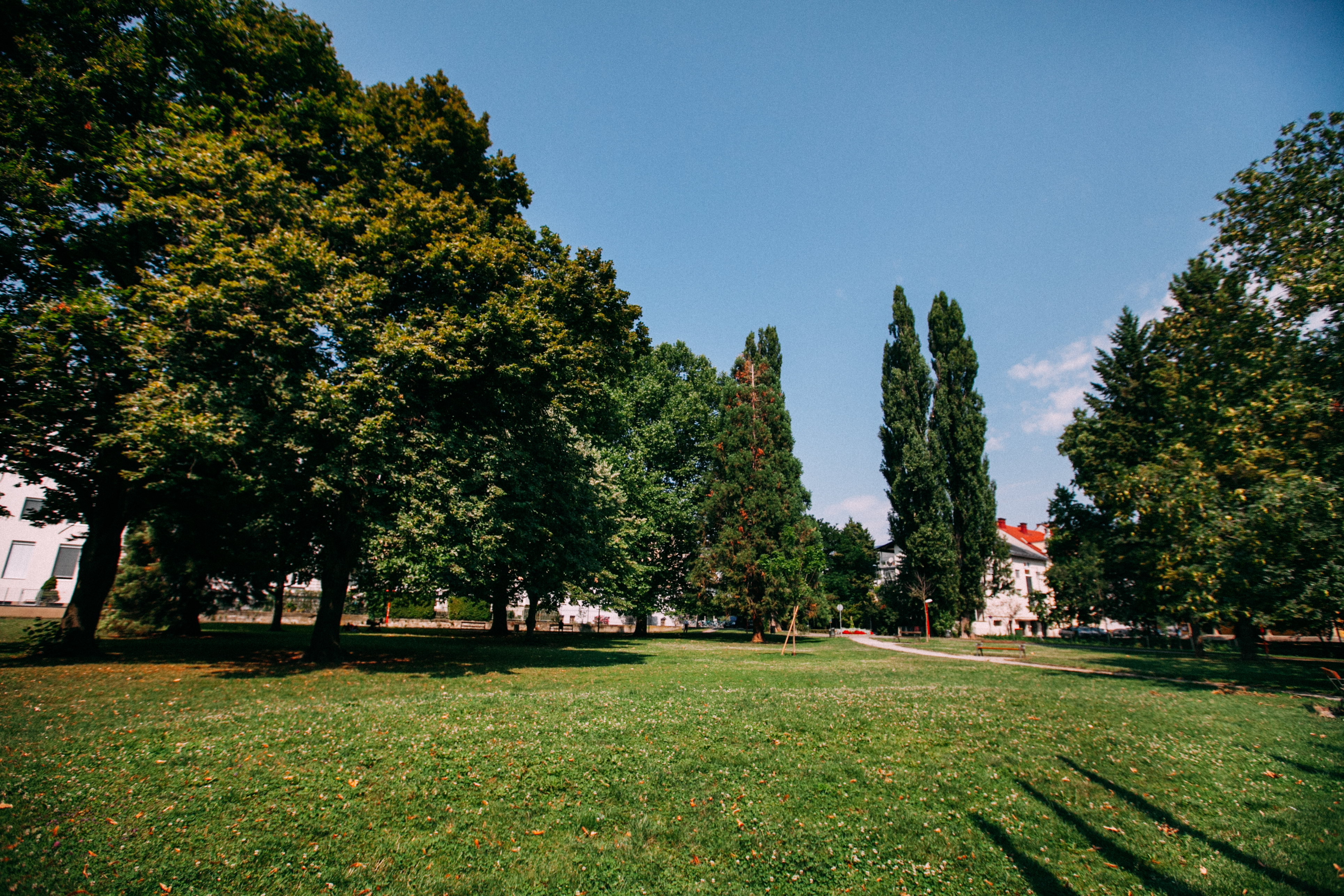 Parkansicht